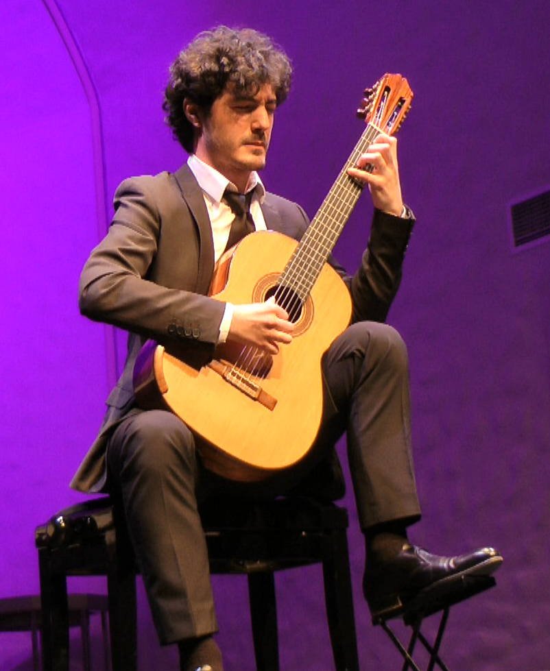 Габриэль Бьянко на концерте в Санкт-Петербурге.